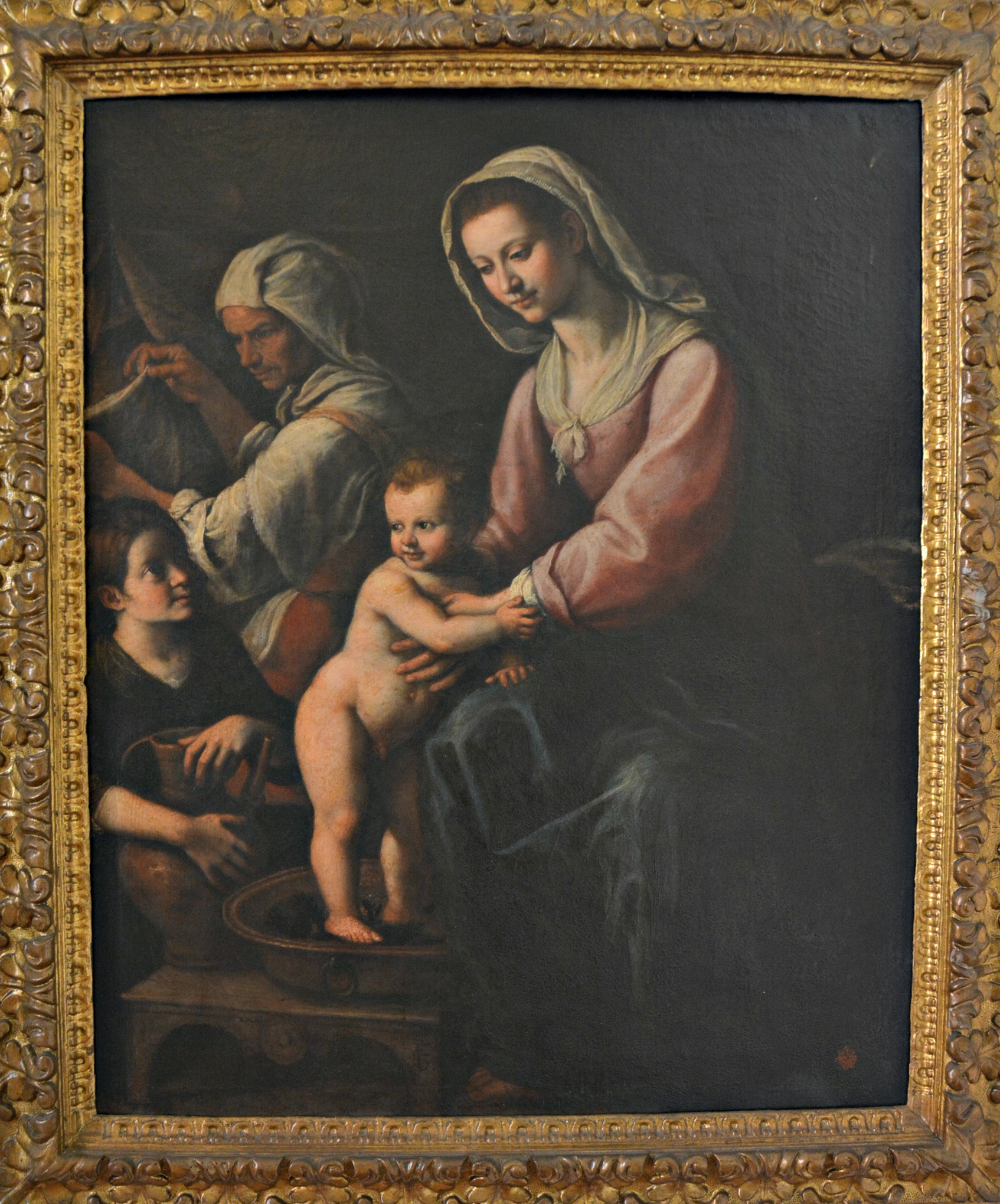 Lavanda del Bambino